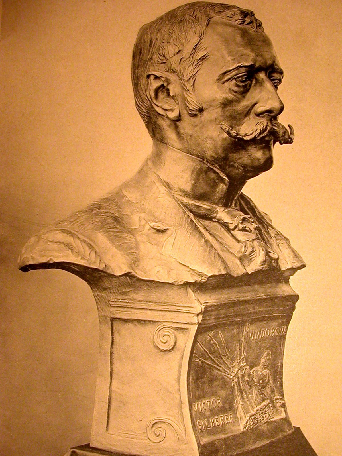 Büste Viktor Silberer